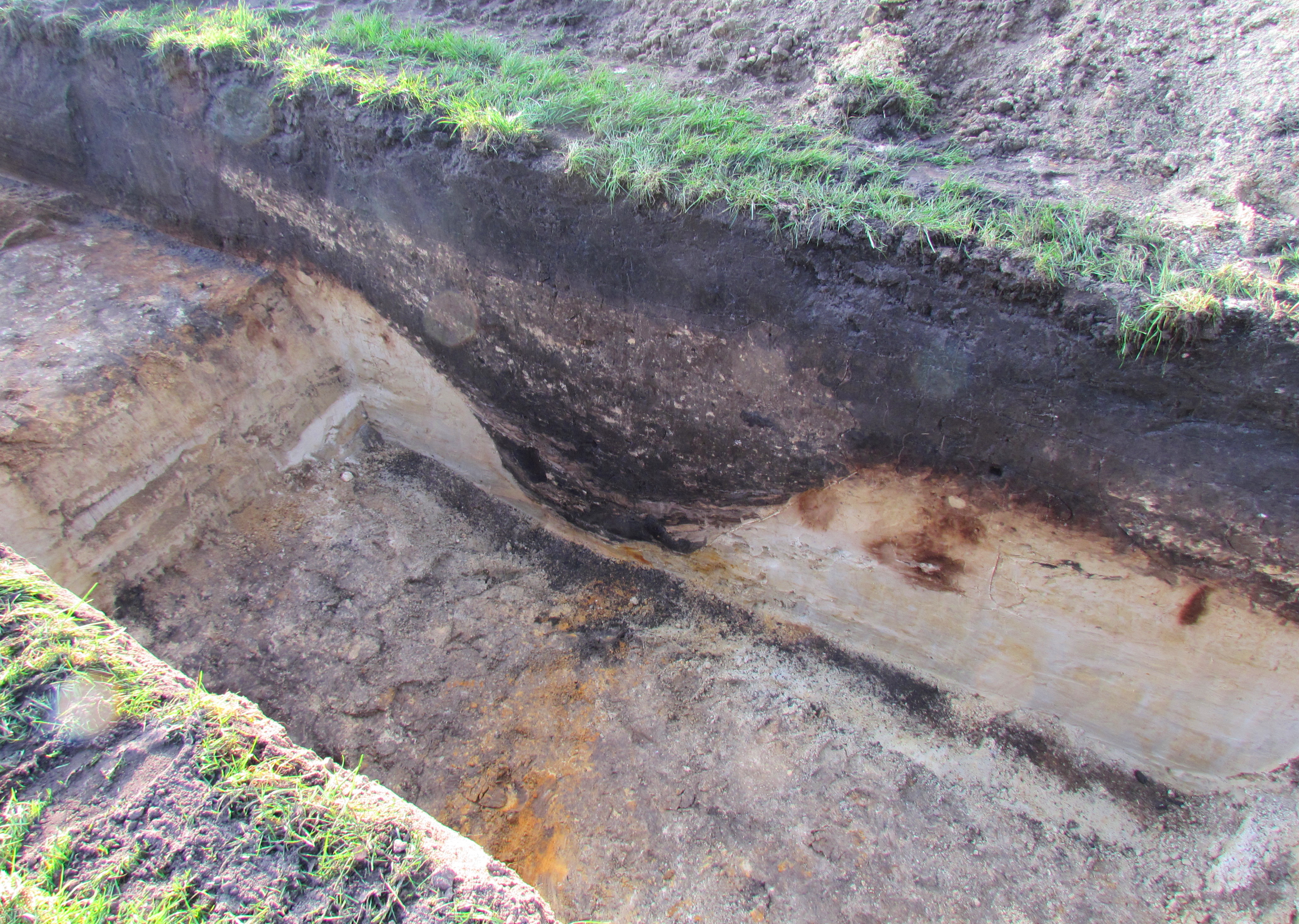 Sleuf in weiland bij Erve Kots te Lievelde (NL) met een bodemprofiel dat vermoedelijk een onderdeel van de 17e-eeuwse Circumvallatielinie van Groenlo toont (de donkere indaling wijst op een met humus gevulde gracht)